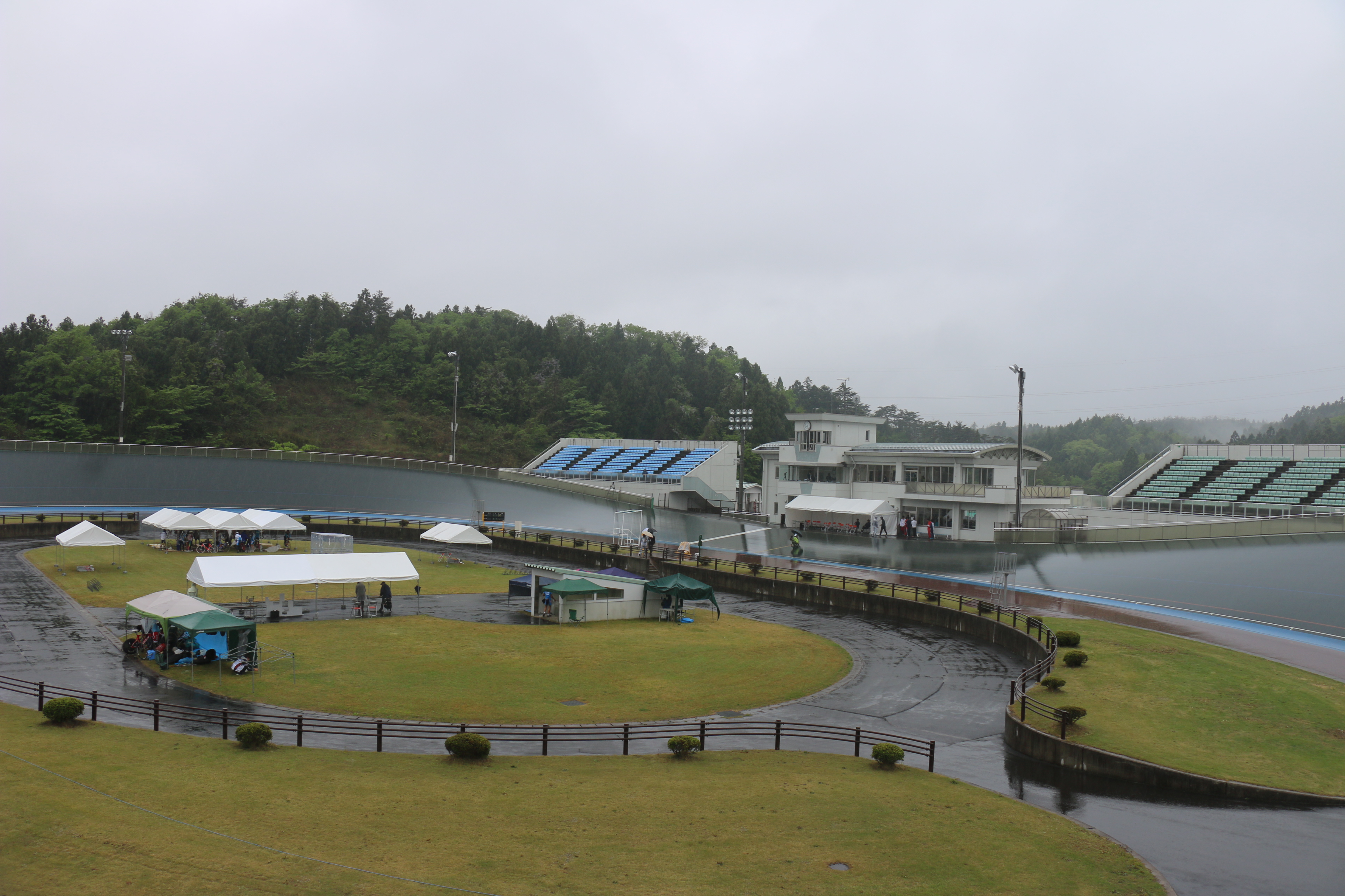 ３コーナーからホームスタンドを望む